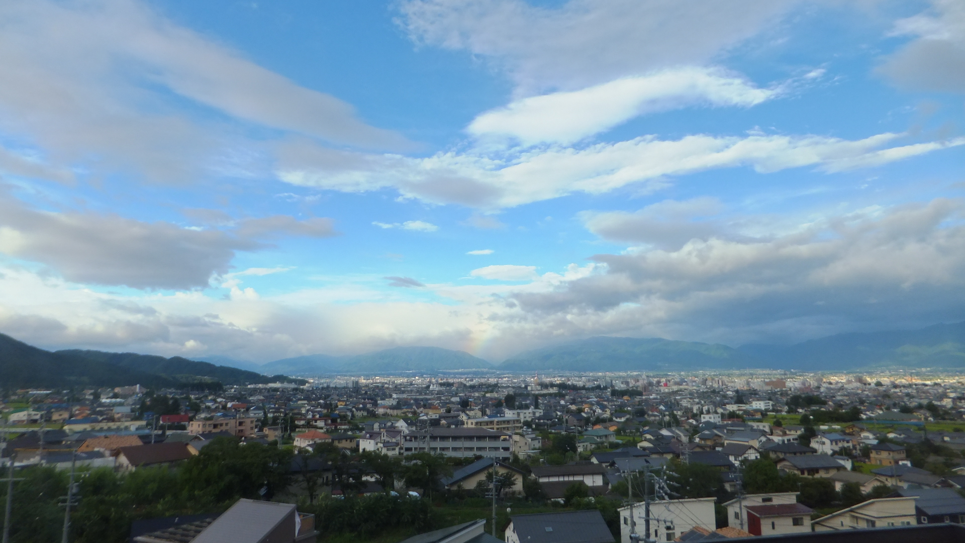 松本市中心部（2014年8月）